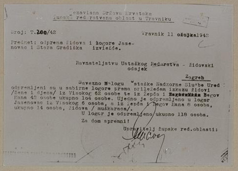 Odlak NDH o transportu Židova u logorSlovenščina: Odlok NDH o transportu in sprejemu judov v taborišče